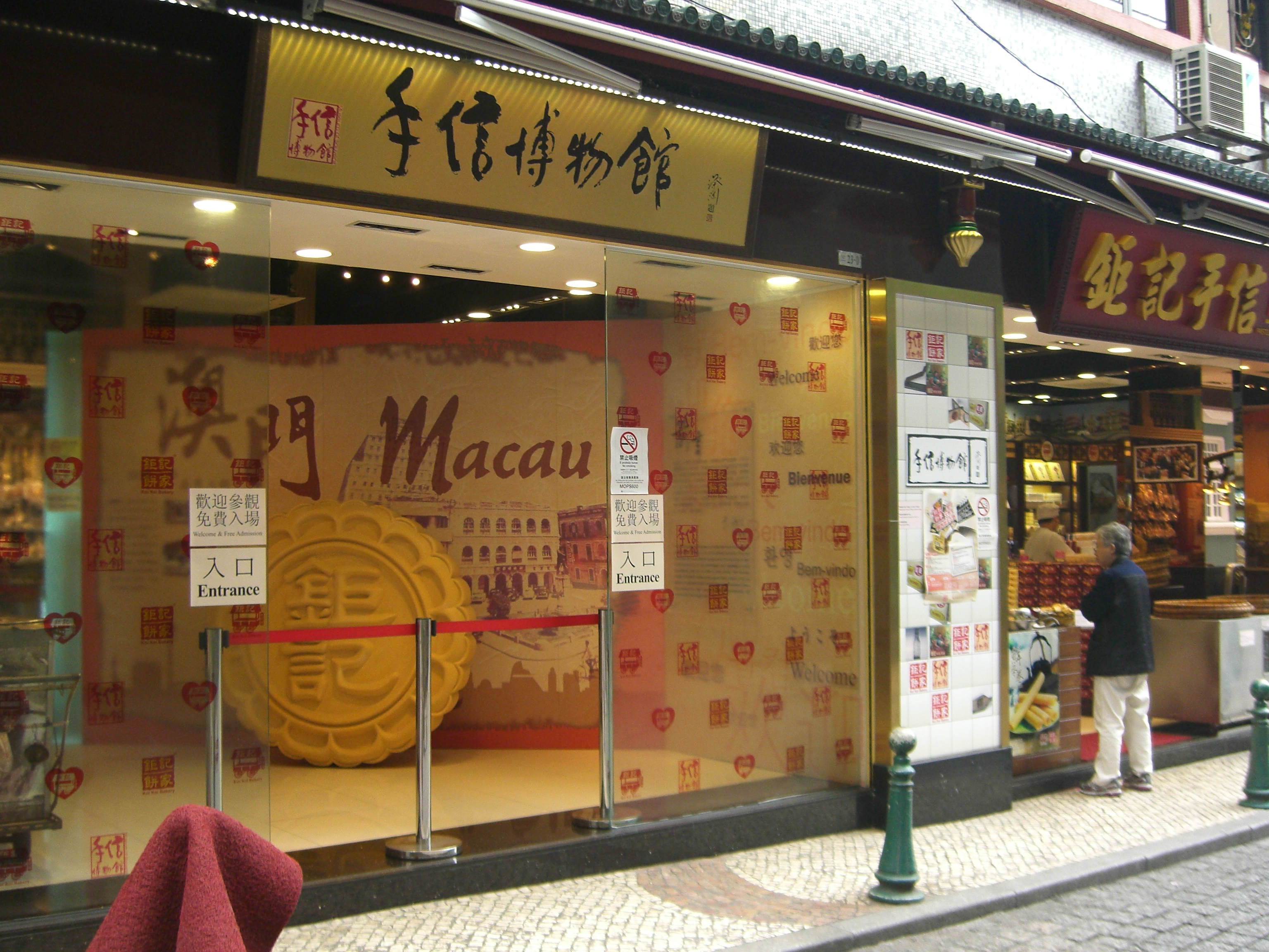 手信博物館